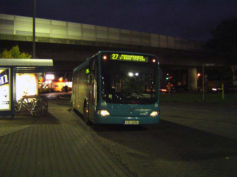 Mercedes-Benz O 520 - Cito